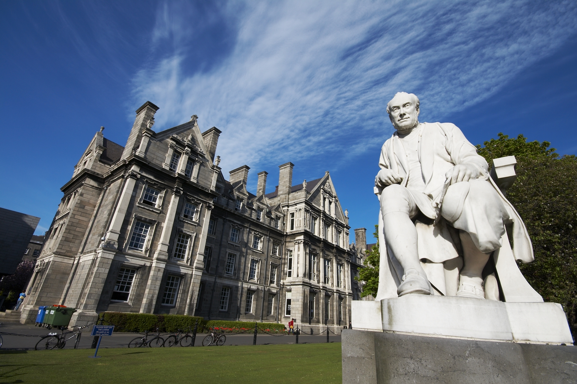 Eso es lo que parece querer decirnos George Salmon a la entrada del campus del Trinity College en Dublin. No me extraña que lo advierta, ya que Dublin tiene una enorme cantidad de atractivos pubs que suponen una tentación continua para un estudiante.